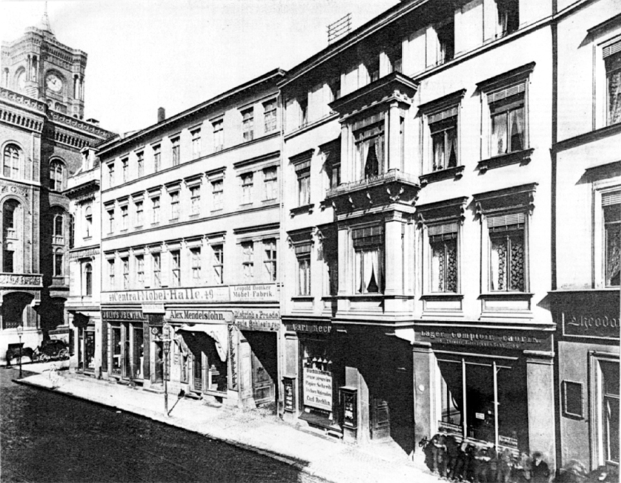 Das ehemalige Blankenfelde-Haus in der Spandauer Straße 49 in Berlin um 1871.